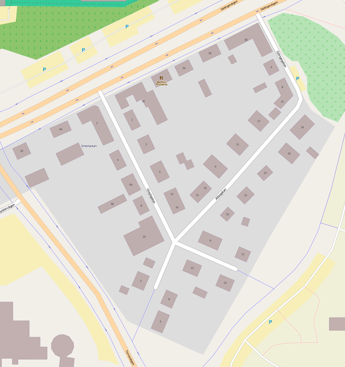 Karta över Smörlyckan i Lund Outlines: 55.71668 13.20281 13.20732 55.71395